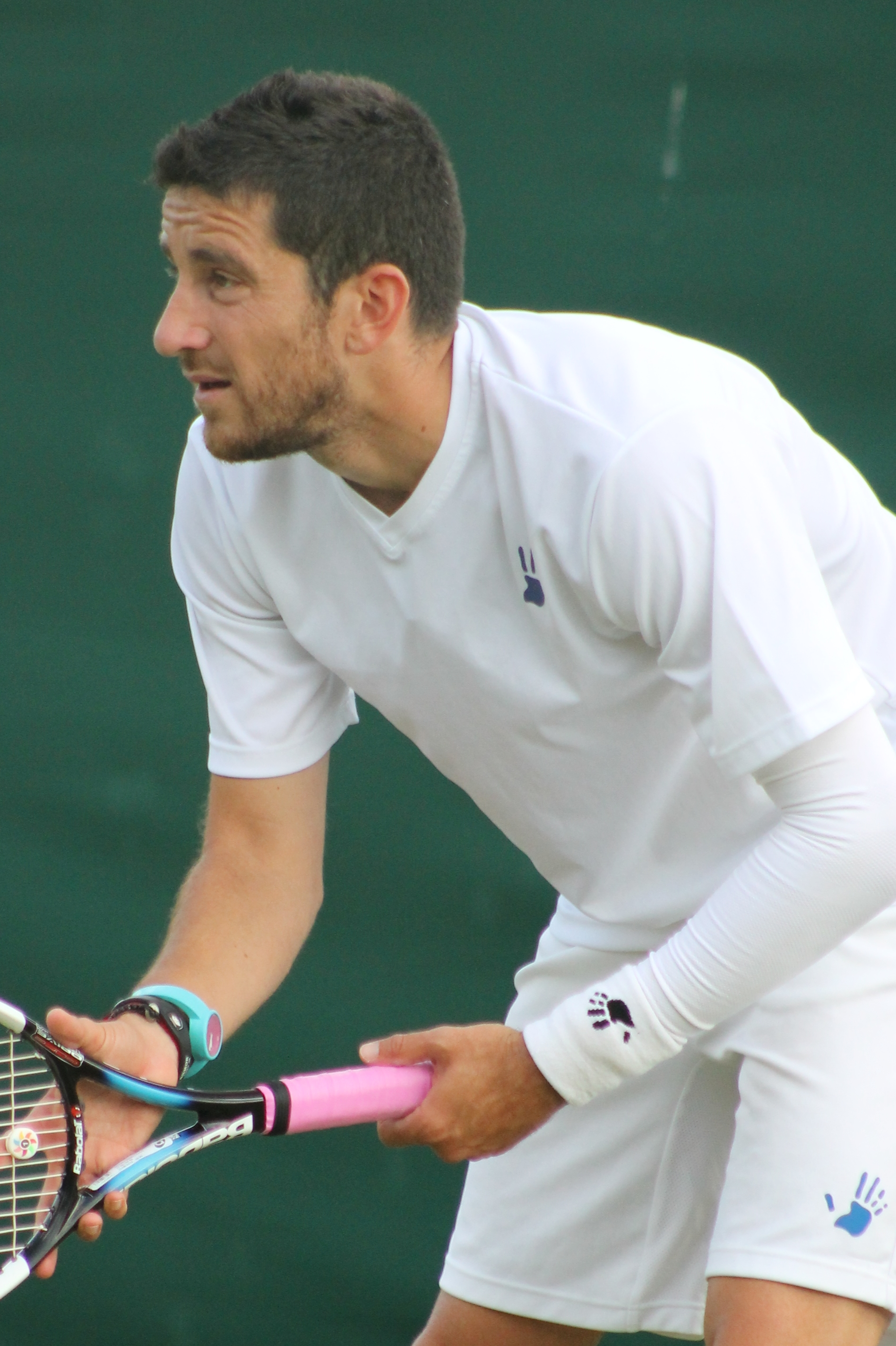 Motti WMQ15 (1)